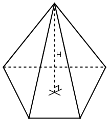 Piramīdas augtums